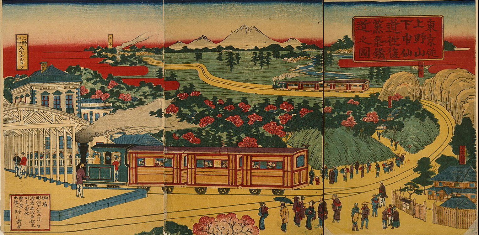 Tōkyō Ueno yama shita yori Nakasendō ōfuku jōkitetsudō no zu / View of Ueno-Nakasendo railway from Ueno station, Tokyo. 東京上野山下より中仙道往復蒸気鉄道の図 東京従上野山下中仙道往復蒸氣鐵道之圖